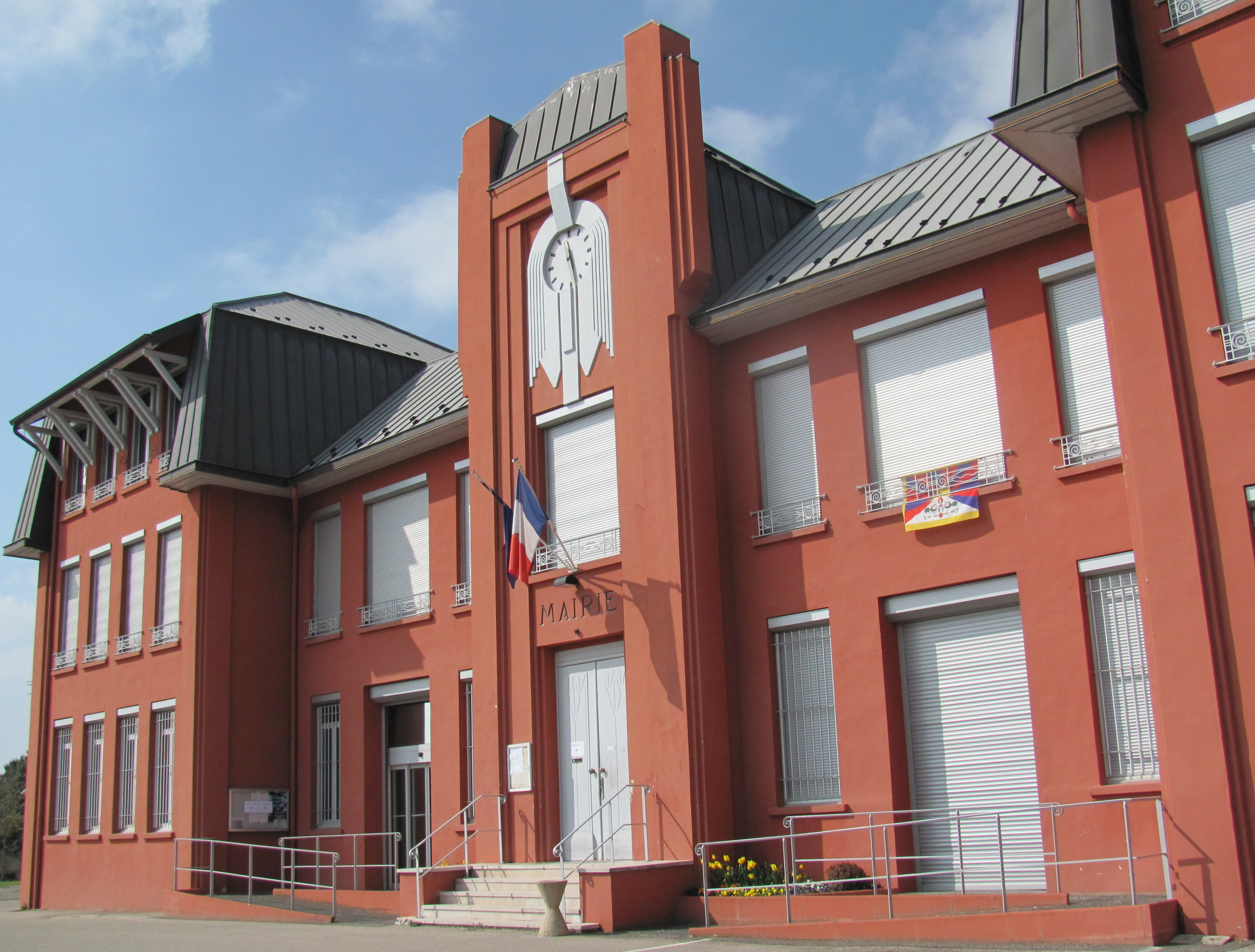 Mairie de Saint-Maurice-de-Beynost, le 20 mars 2011 (1er tour des cantonales, la mairie est l'un des deux bureaux de vote de la commune). Accroché à l'une des fenêtres, le drapeau tibétain.